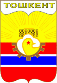 Герб Ташкента советского времени